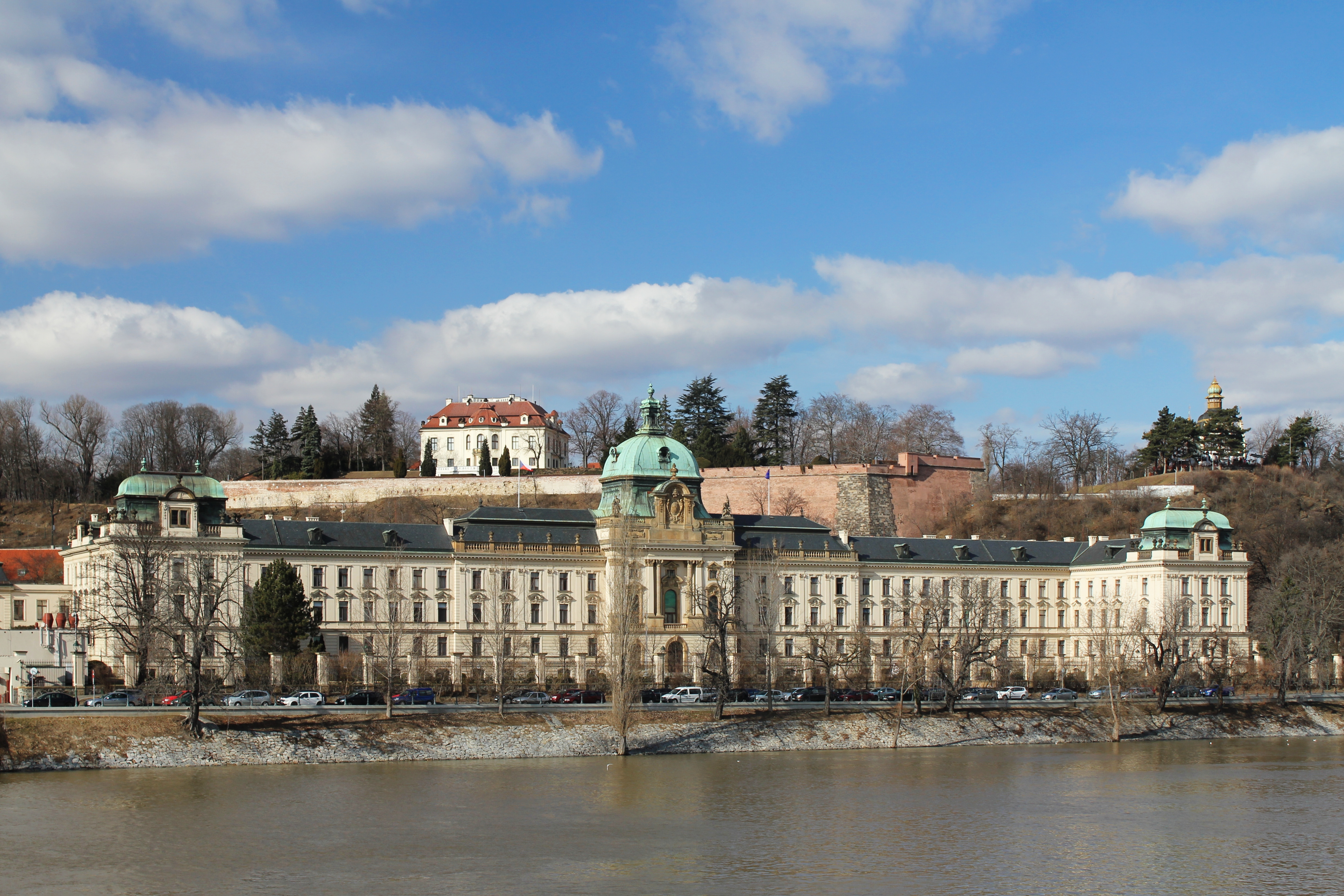 Strakova akademie a Kramářova vila z Mánesova mostu.